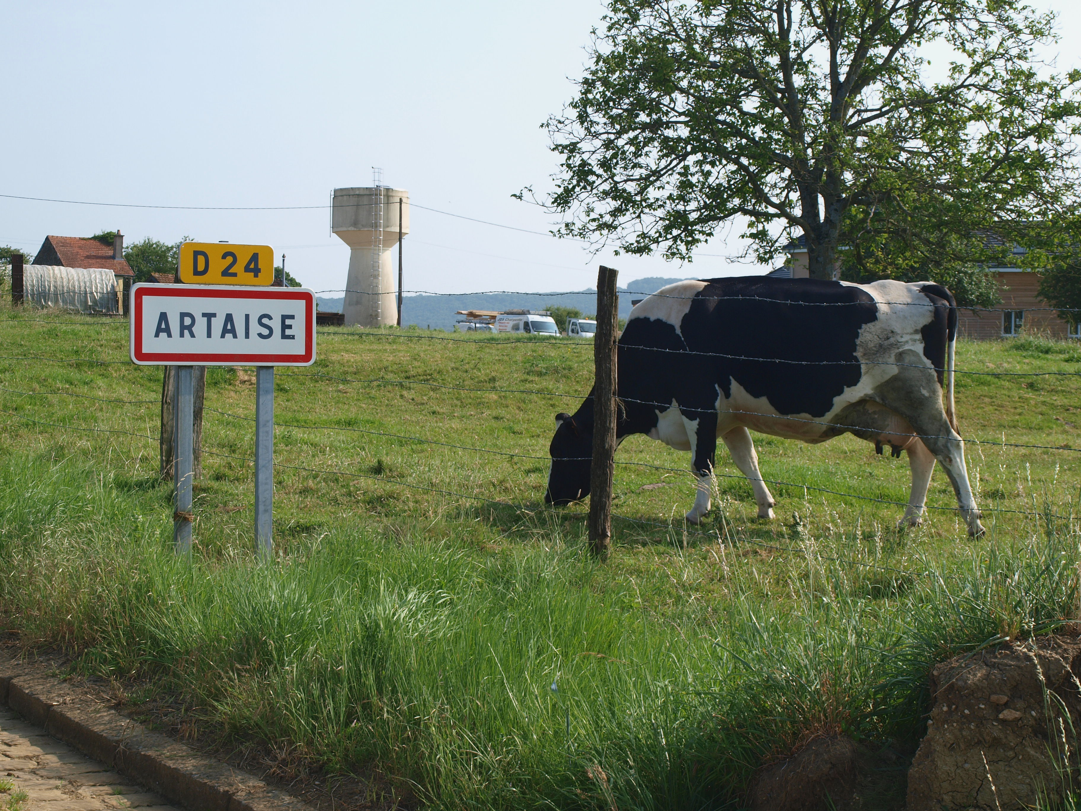 Artaise-le-Vivier (Ardennes, France) ; Artaise, panneau dans son écrin rural